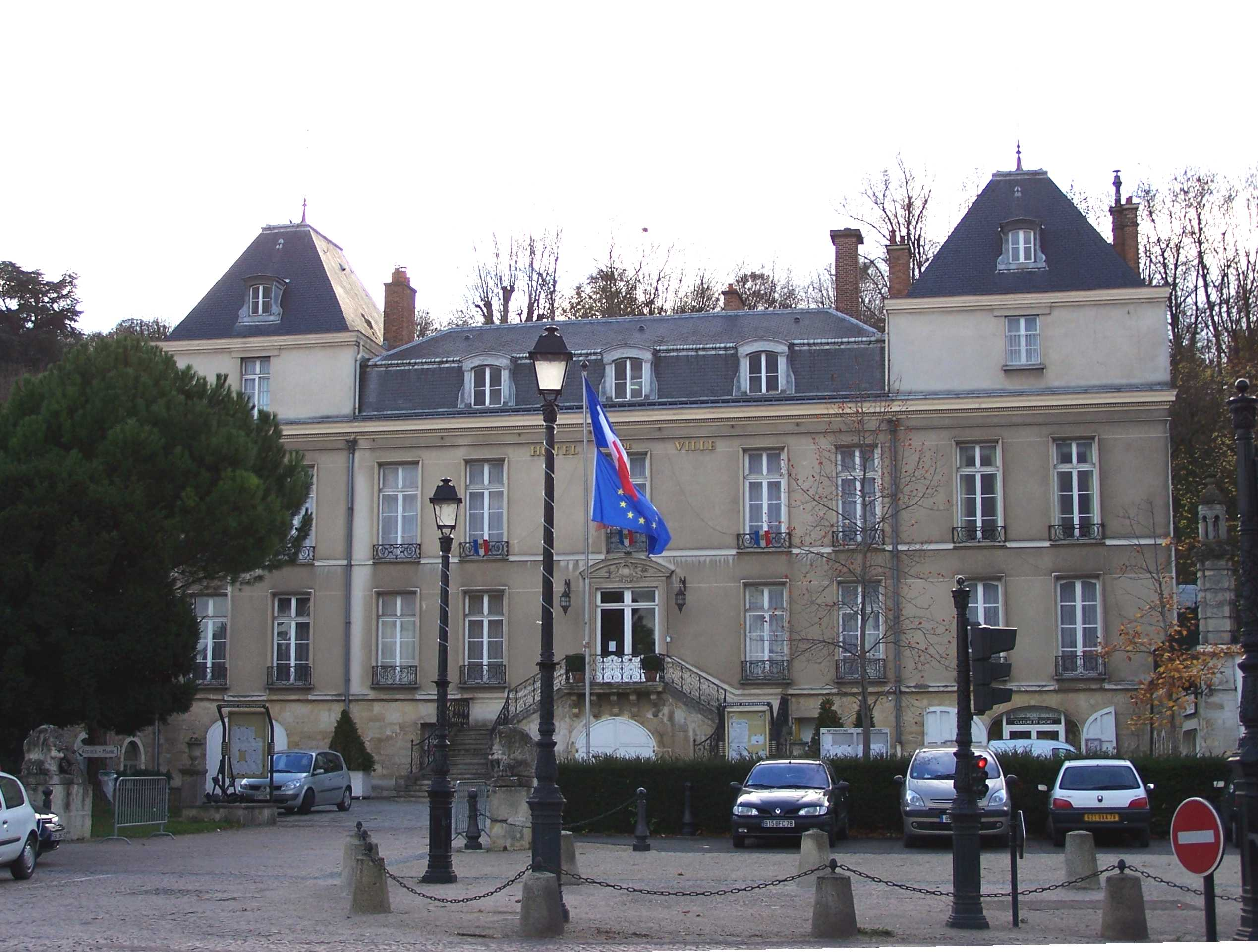 Hôtel de ville du Port-Marly (Yvelines, France)